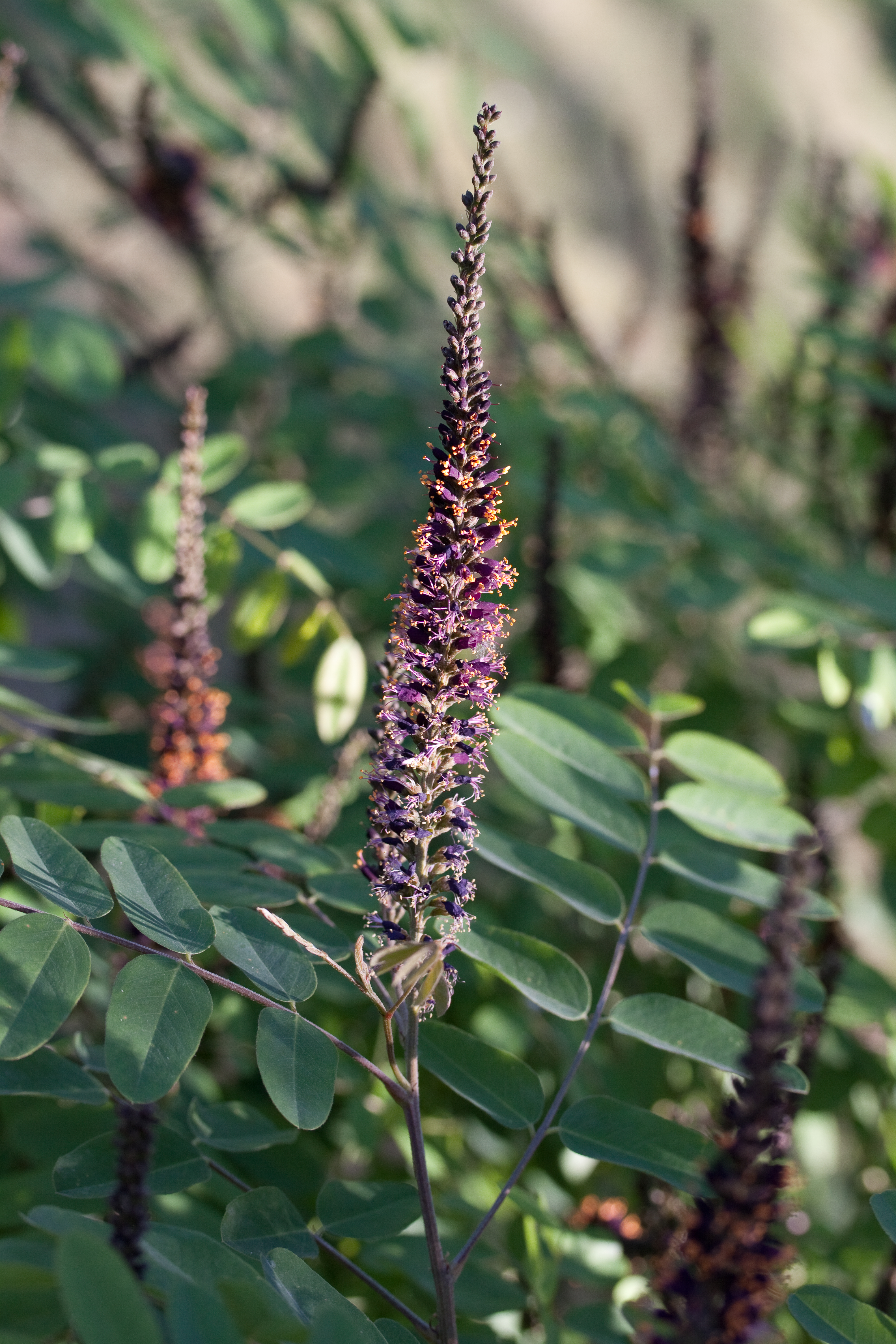 Fleurs de Amorpha ouachitensis - Jardin des Plantes - Paris - France